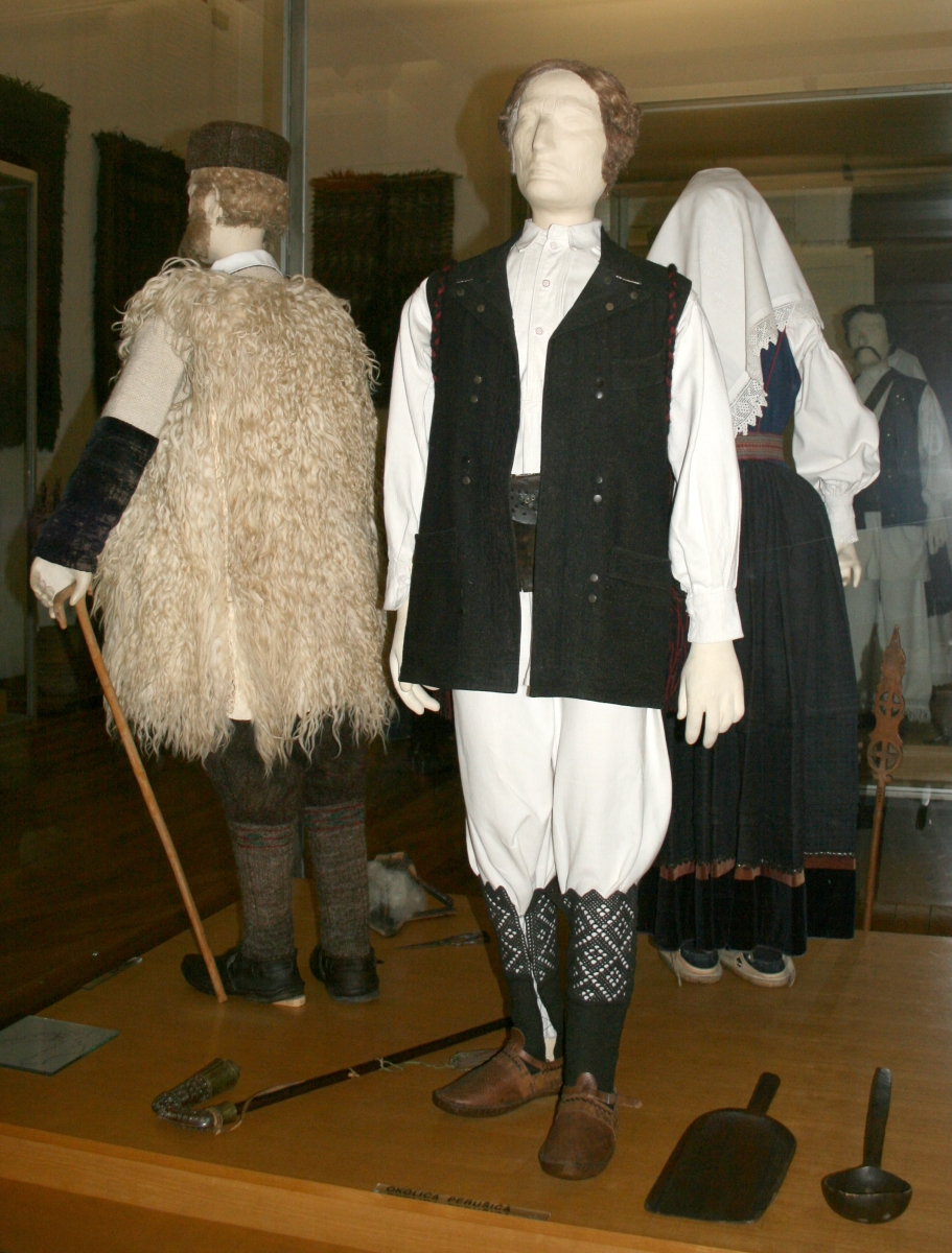 snimljeno tijekom Noći muzeja u Etnografskom muzeju u Zagrebu